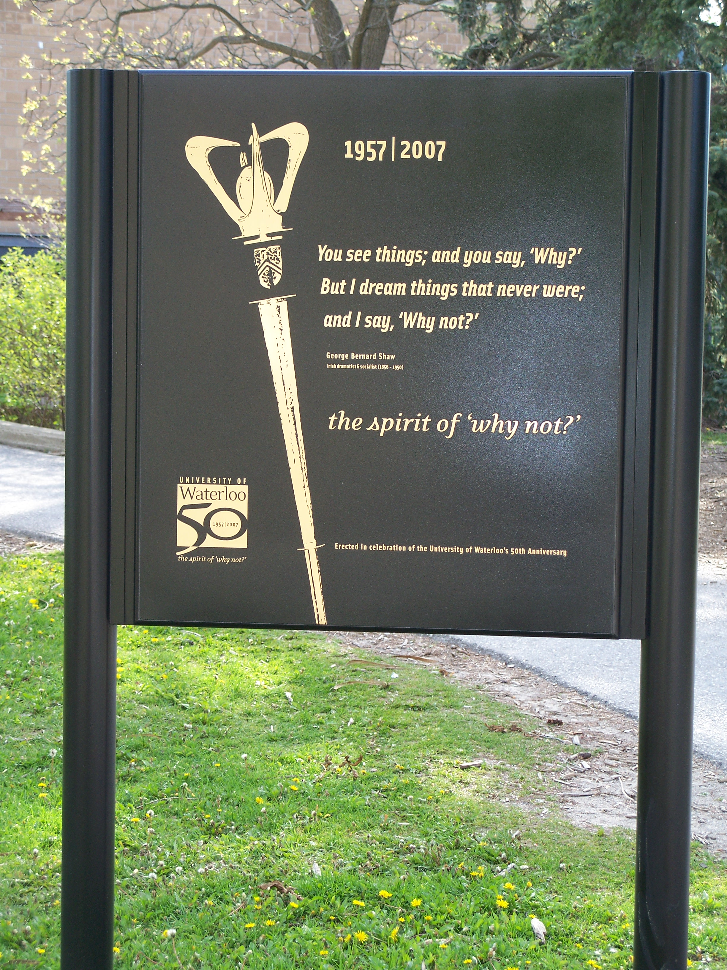 Юбилейная доска посвященная 50-летию университета. Университет Ватерлоо, Онтарио, Канада. 16 мая 2010 года.